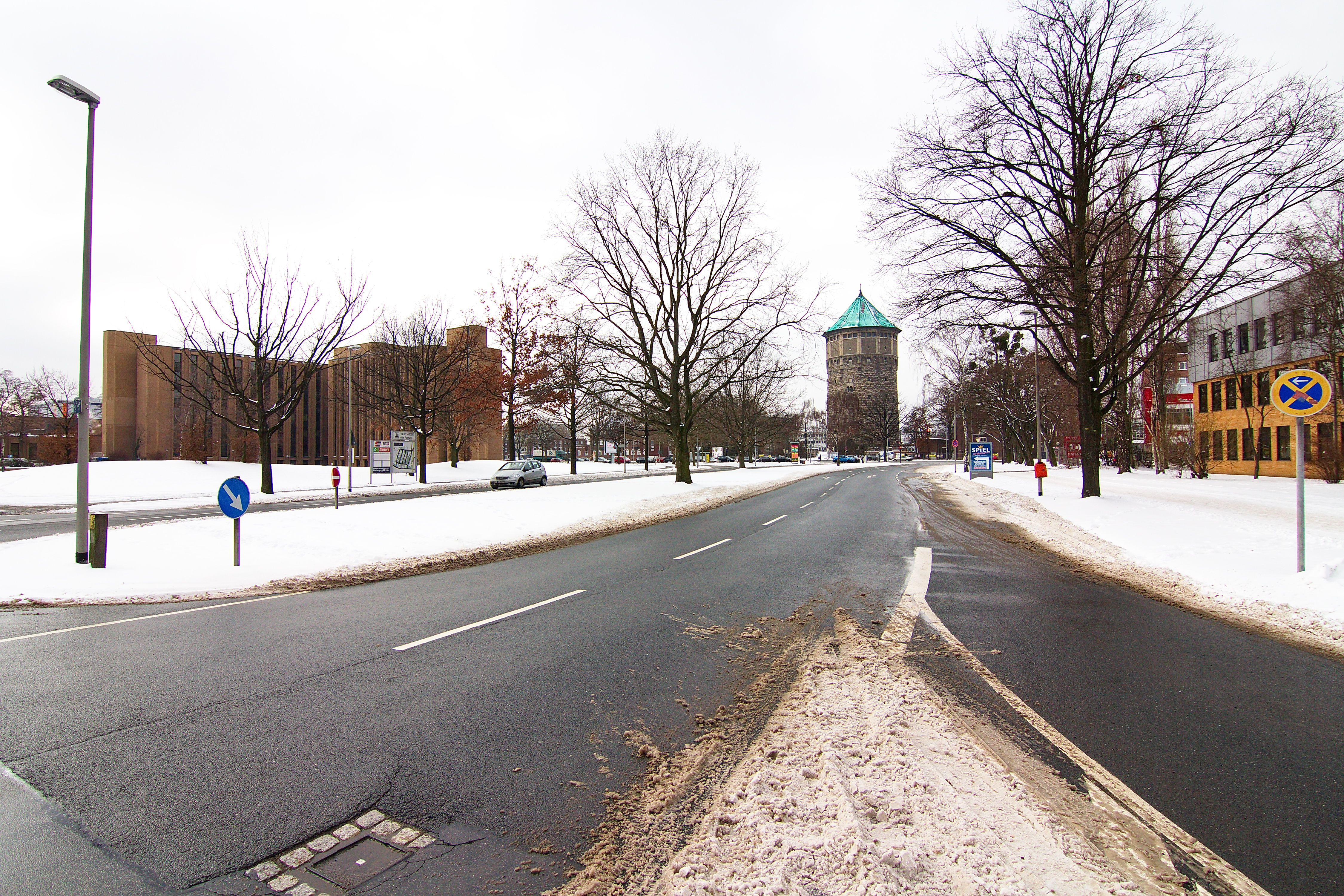 Ortsbild von Alter Flughafen in Vahrenheide (Hannover), Niedersachsen, Deutschland